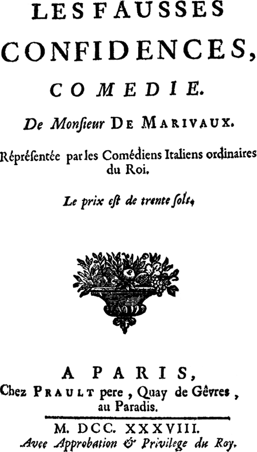 The False Confidences (1738) by Pierre de Marivaux (1688-1763)